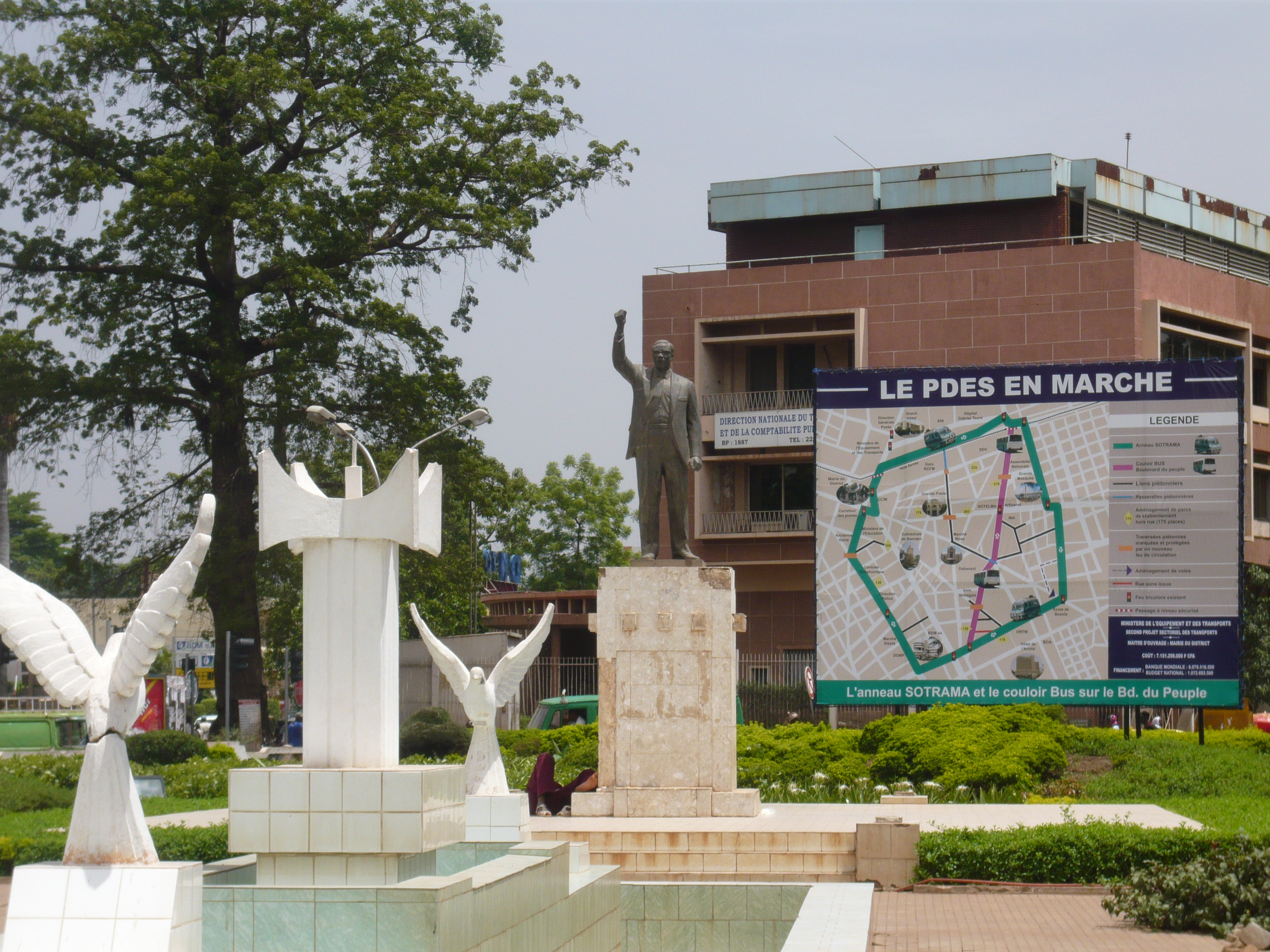 Statue de Patrice Émérite Lumumba, Quartier du fleuve - Bamako, Mali